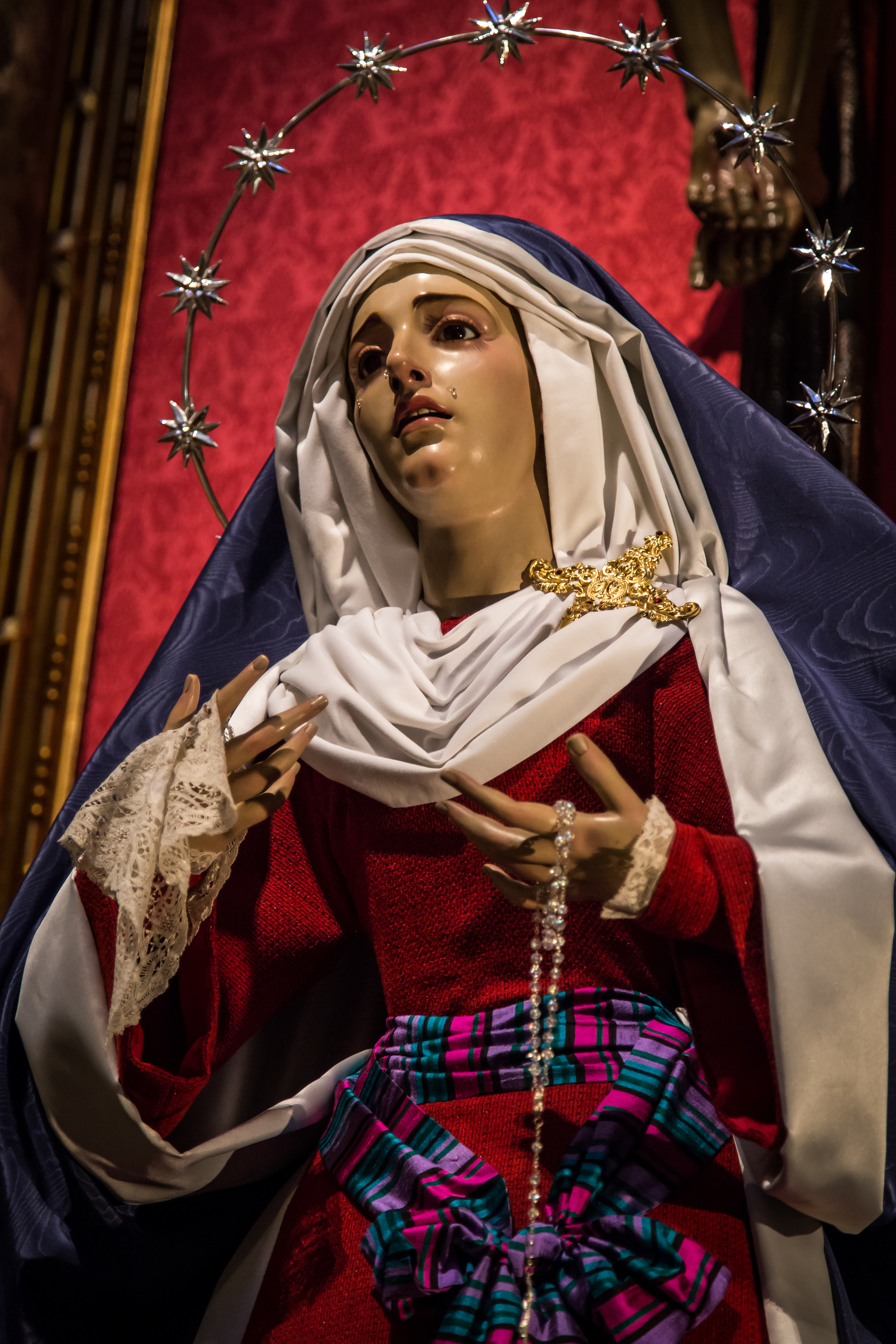 Imagen de María Santísima Inmaculada, Madre de la Iglesia. Capilla de las sagradas imágenes de la Hermandad Sacramental y Cofradía de Nazarenos de "Los estudiantes". Basílica Pontificia de San Miguel, Madrid.